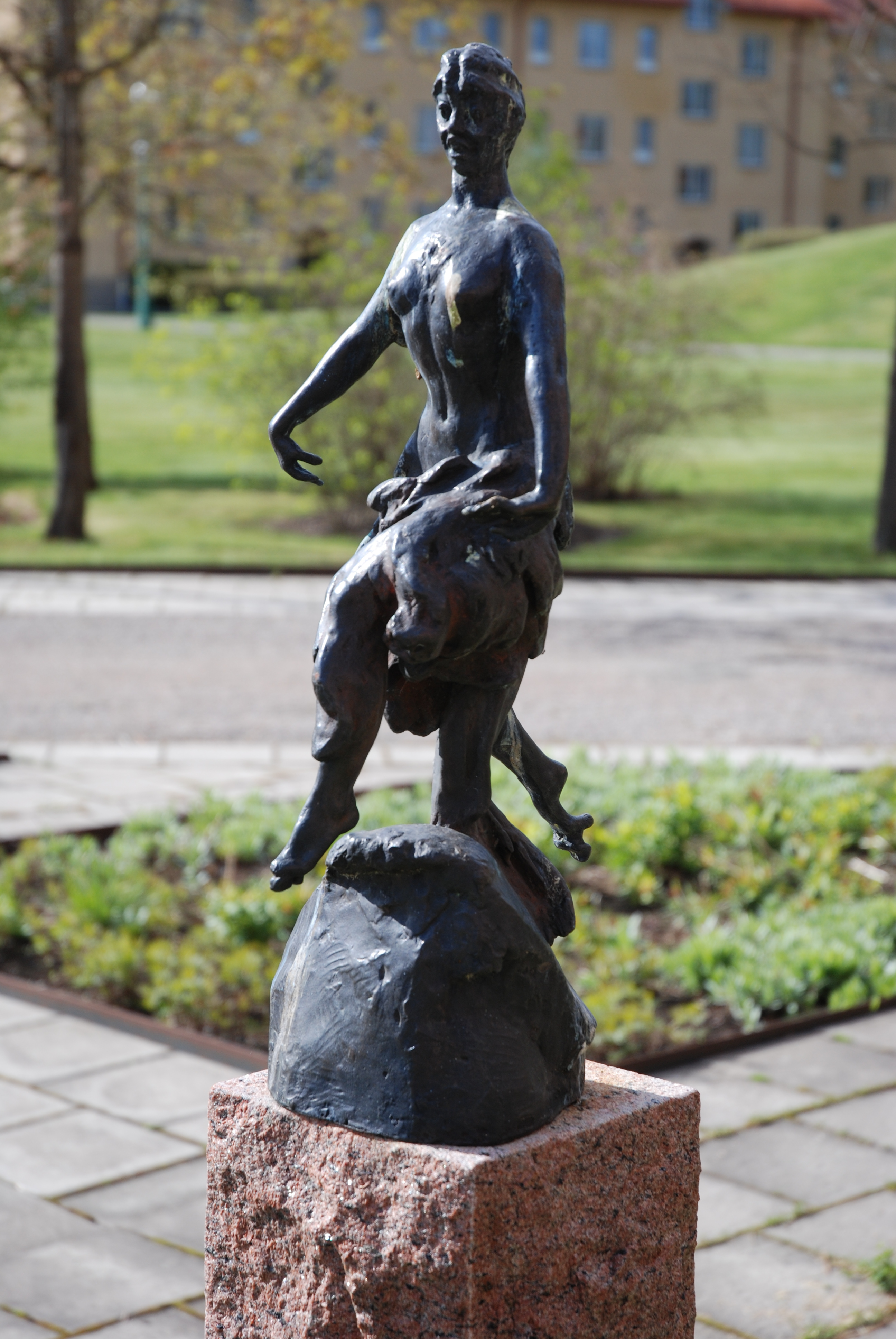 Christian Ericsson´s Skogsråa (Huldra), Hällefors, Sweden